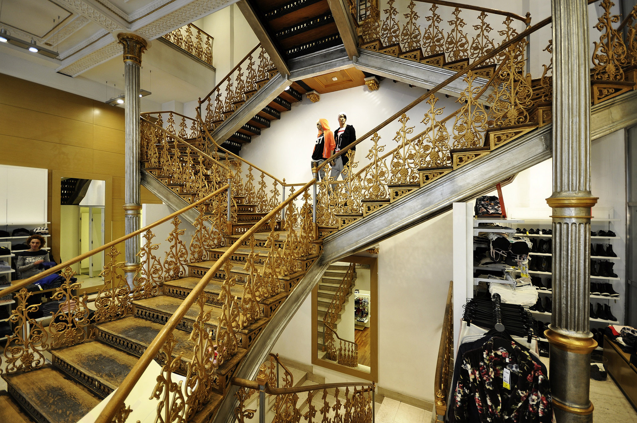 Obchodní dům, Praha 1, Na příkopě 847/4, Nové Město (Praha).